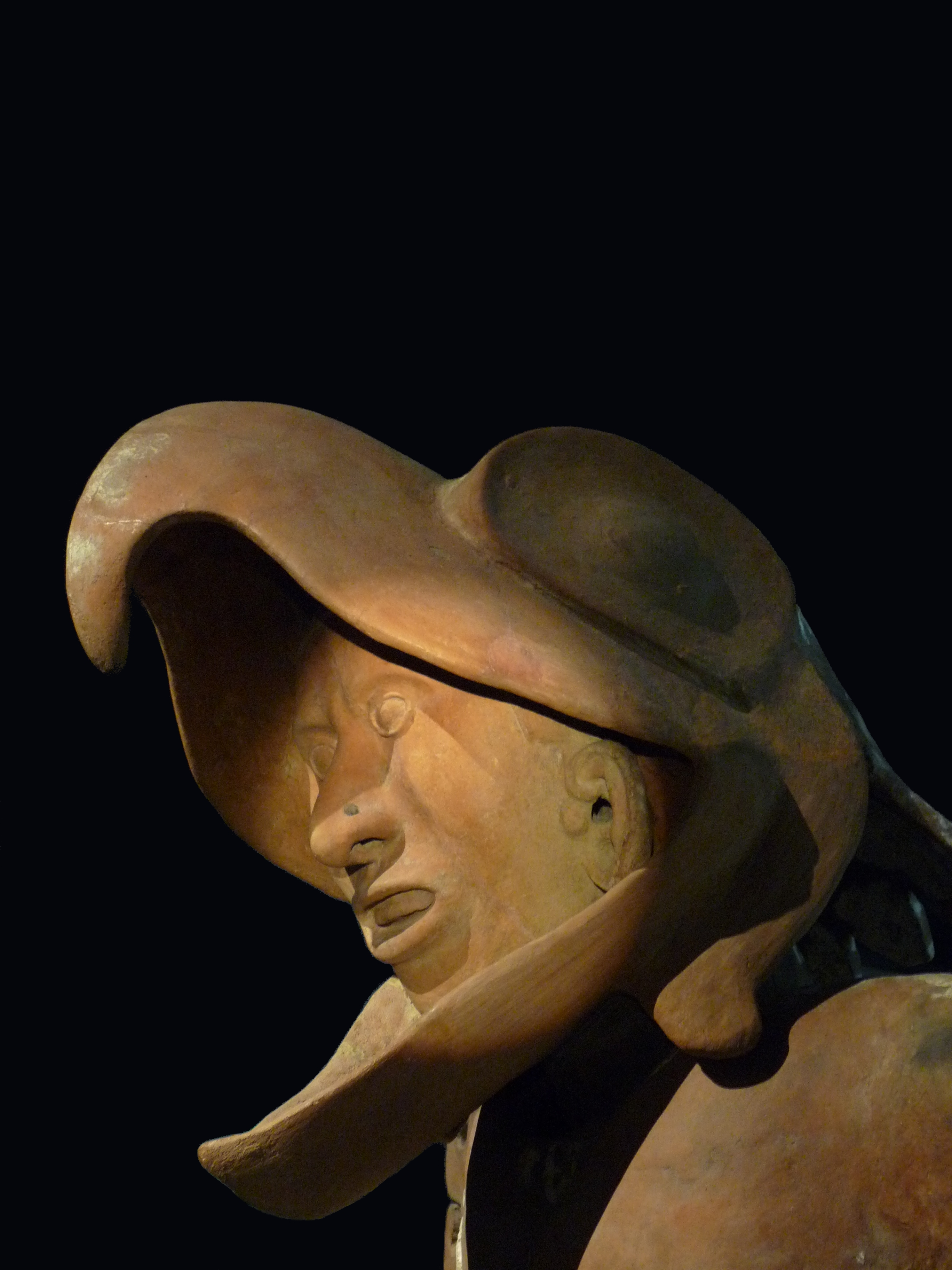 Estatua de guerrero águila de la casa de los águilas (Museo del Templo Mayor, Mexico D.F.).